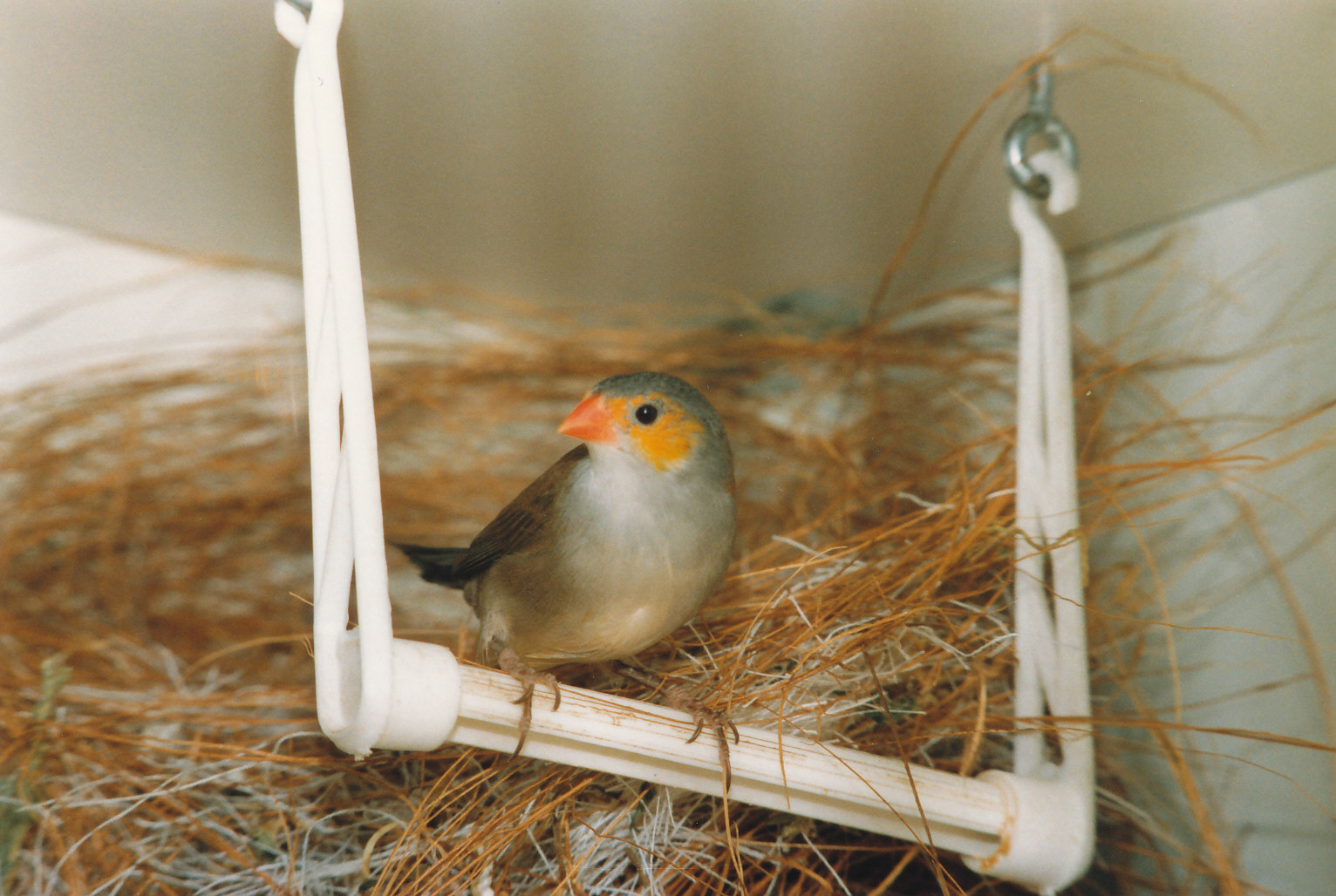 Orangebäckchen beim Nestbau